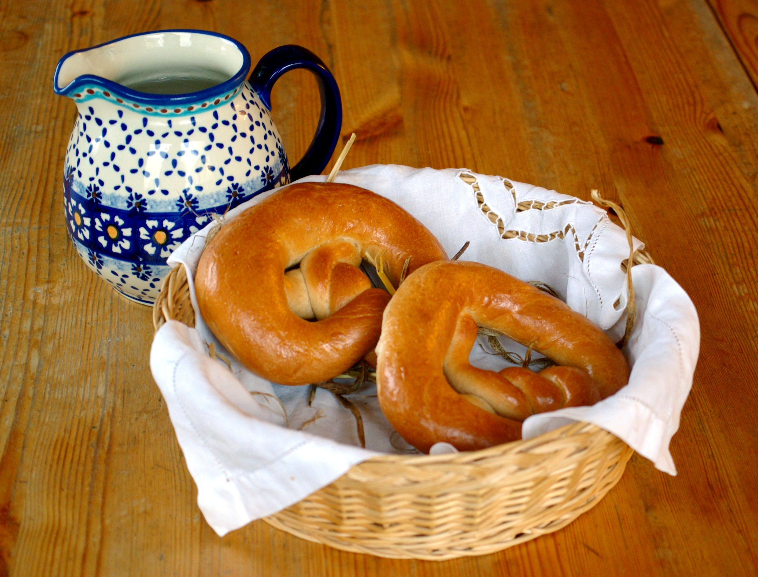 Fastenbrezel vom Bäcker Bader